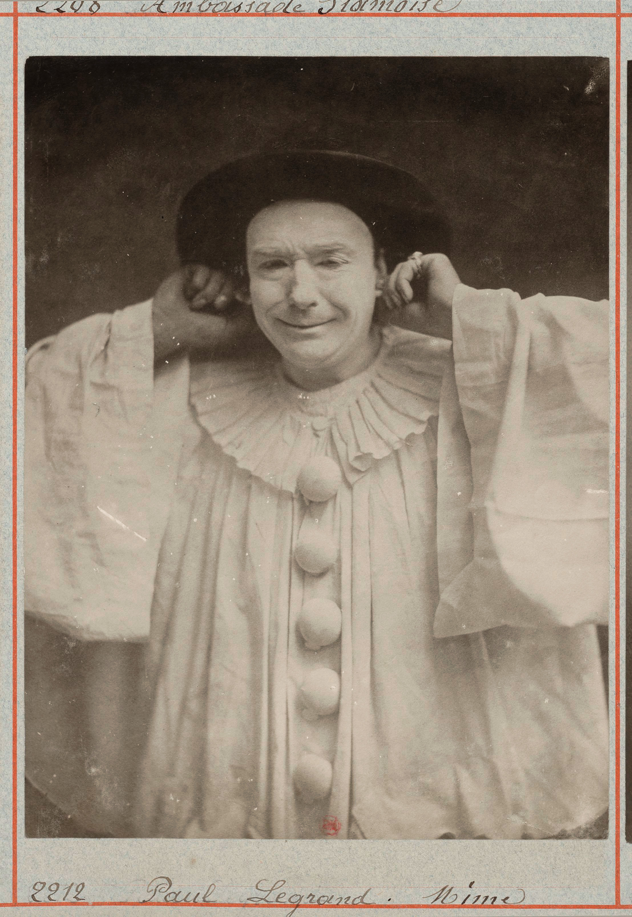 Paul Legrand (1816-1898)